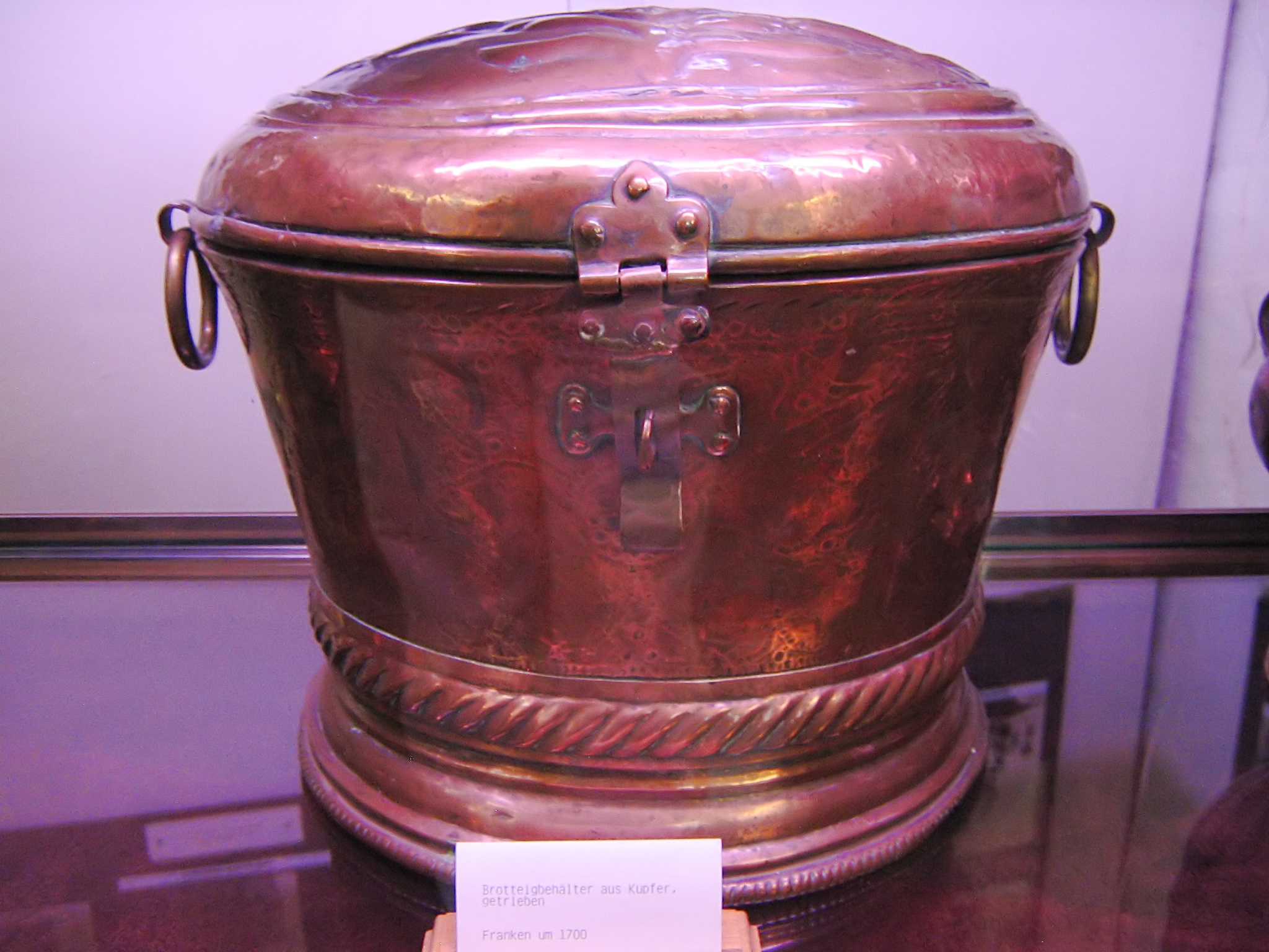 aufgenommen im Historiengewölbe und Staatsverlies von Rothenburg ob der Tauber, Deutschland